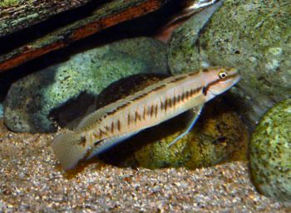 Telmatochromis sp congo mâle